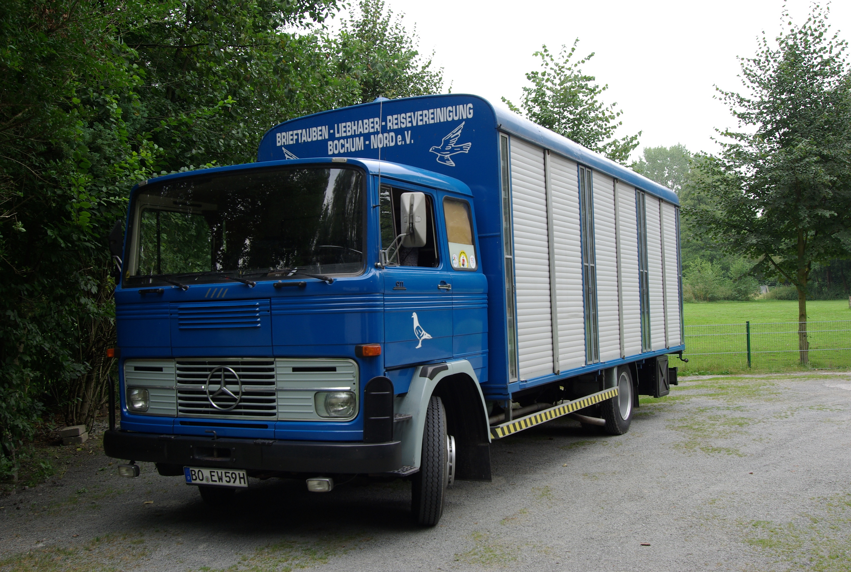 Brieftaubentransporter für Wettbewerbe. Mit freundlicher Genehmigung der reisevereinigung Bochum-Nord e.V.